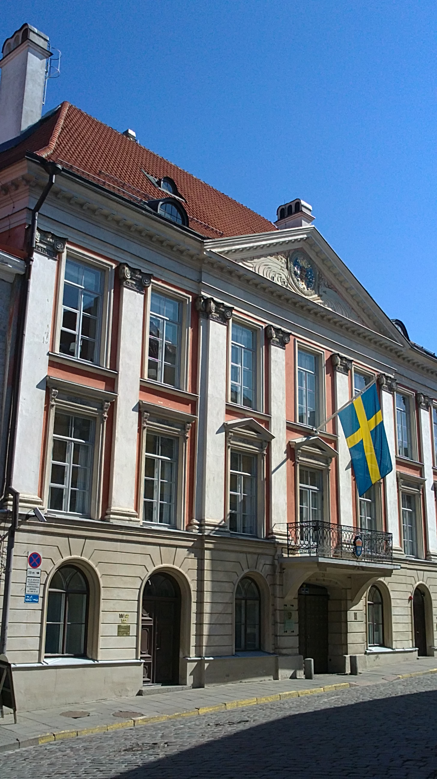 Pikk tänav, 28 hoone Tallinna vanalinnas